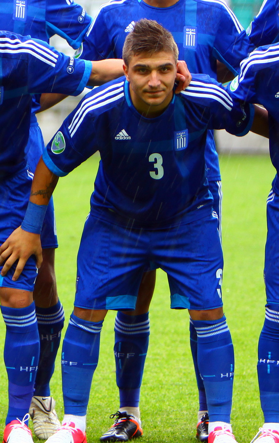 Catherine Kõrtsmik